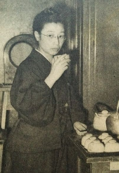 松谷天光光